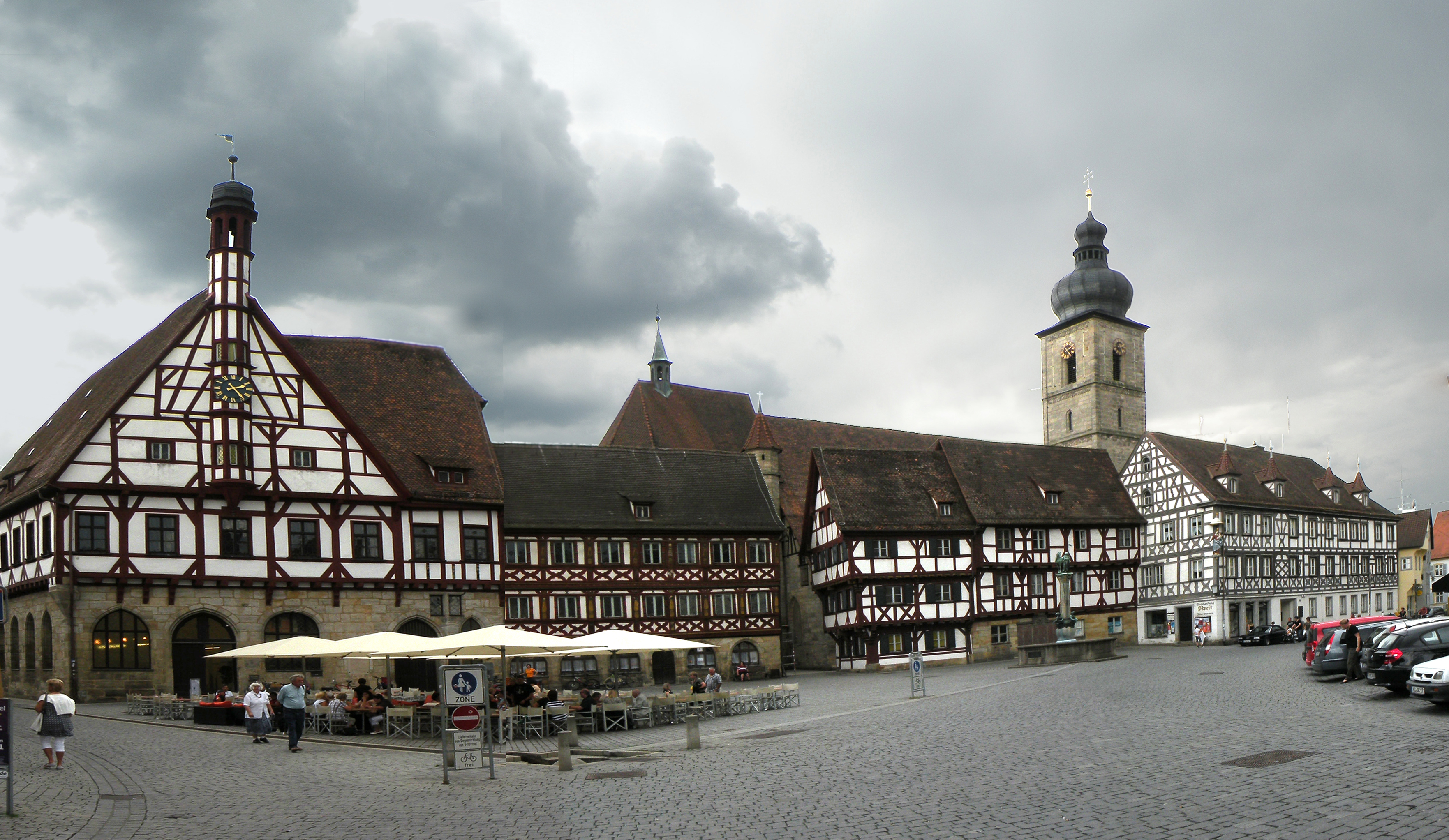 Forchheim.Marktplatz